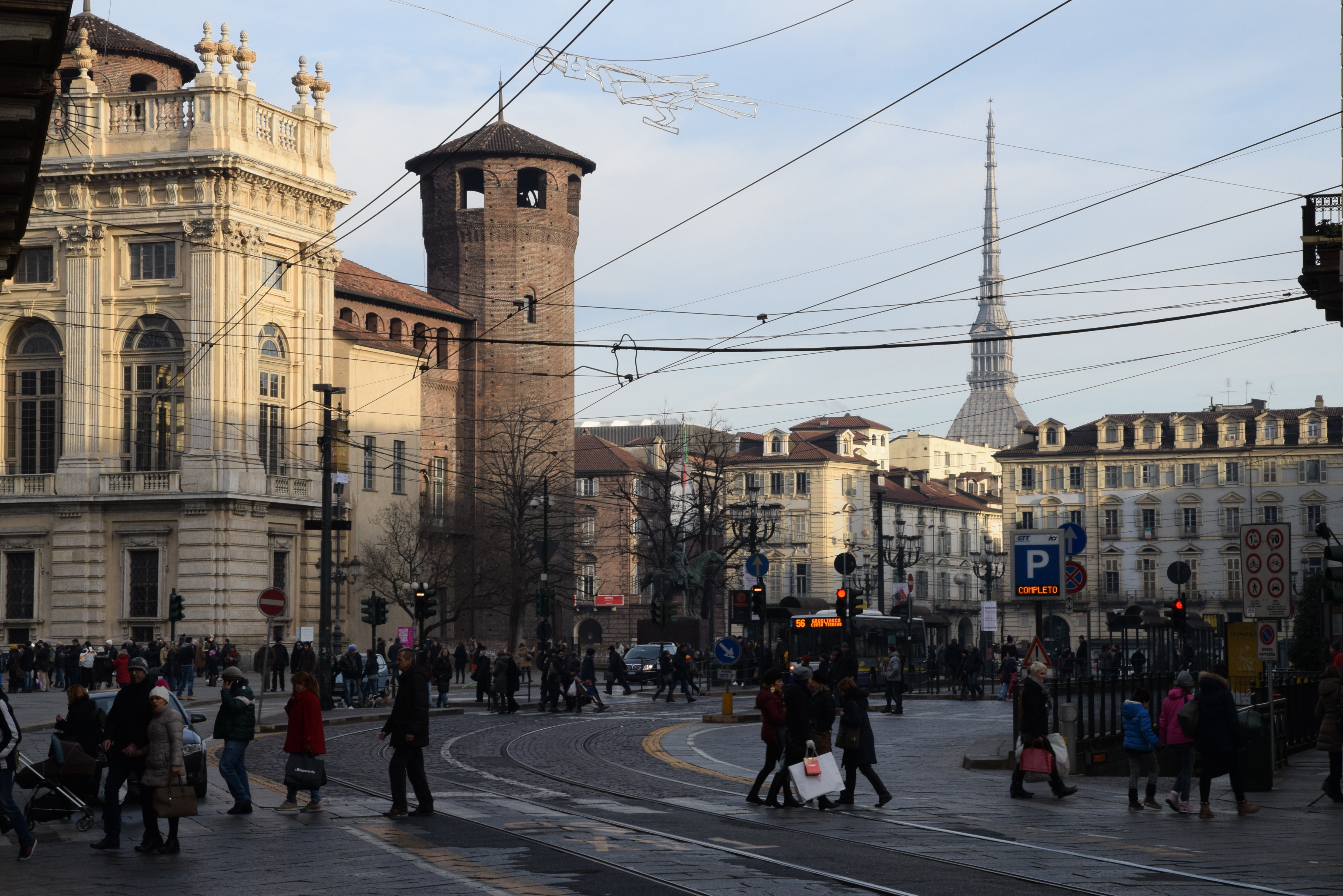 Piazza Castello con Palazzo Madama e Casaforte degli Acaja This is a photo of a monument which is part of cultural heritage of Italy.